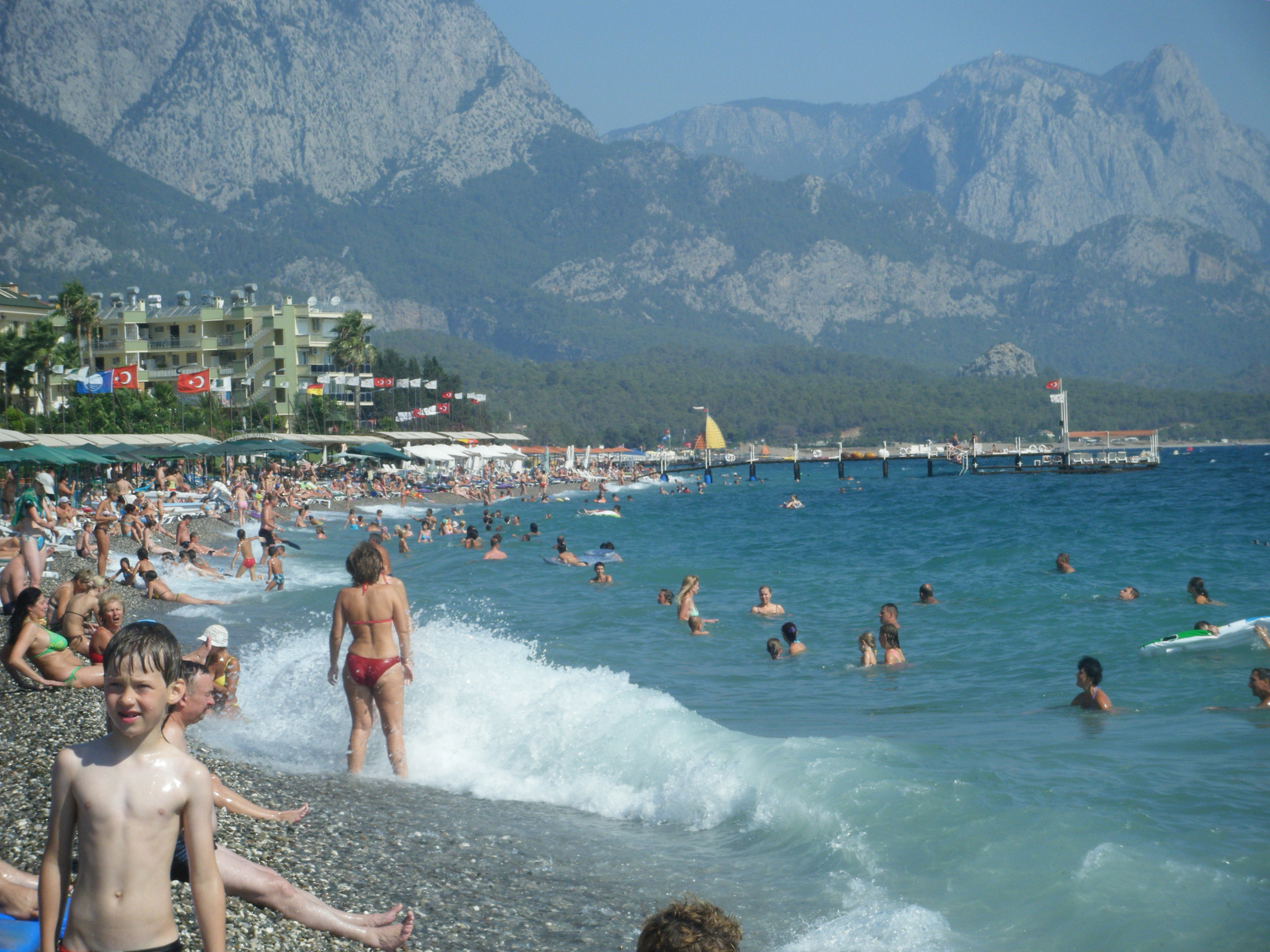 Pohled z pláže